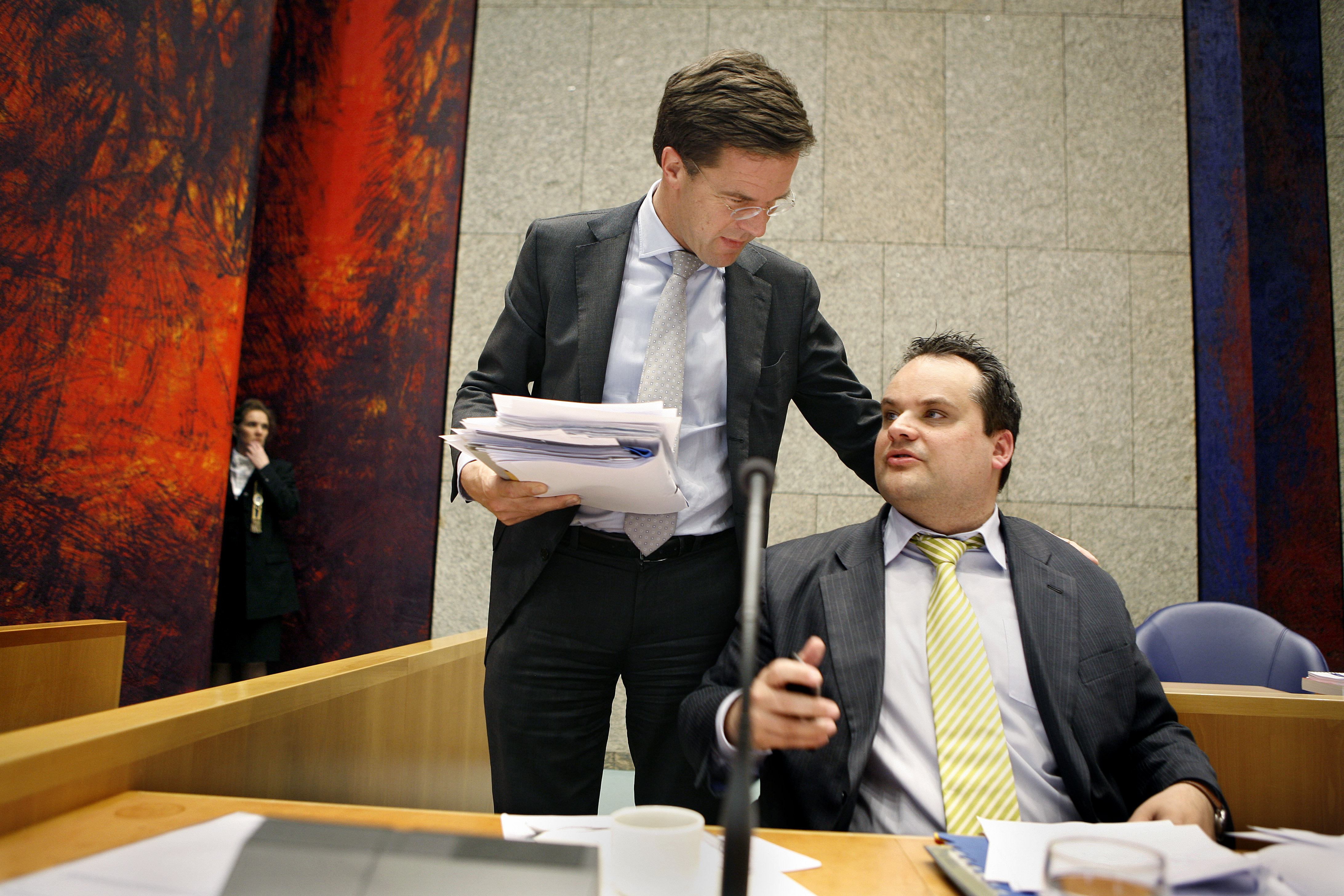 De minister-president arriveert in vak K om samen met minister De Jager en staatssecretaris Knapen te debatteren met de Tweede Kamer over de Europese Raad van 24 en 25 maart.